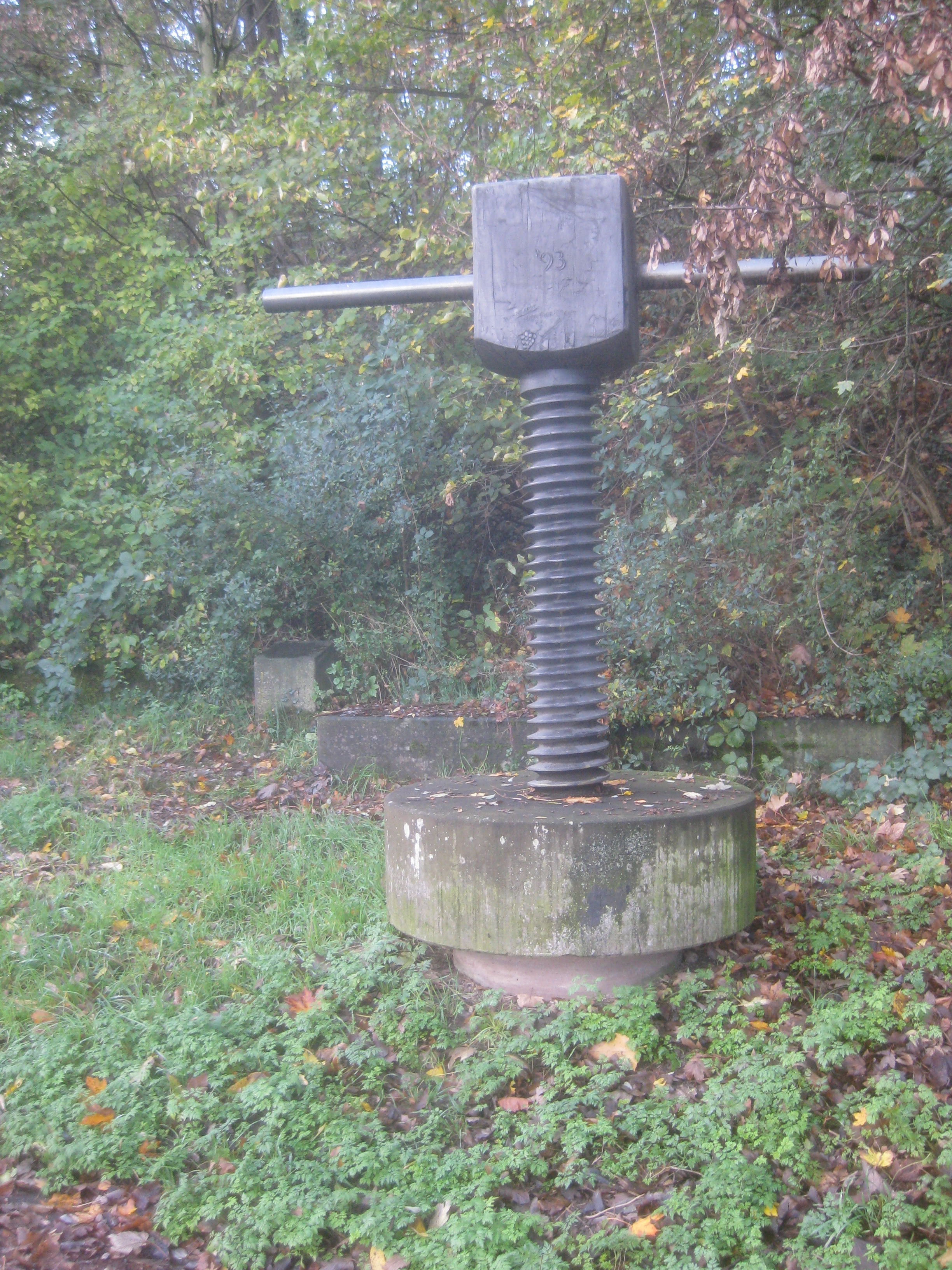 Weinpresse und Lyrikstation mit einem Gedicht („XXX“) von Peter Schlack, bei der Weinpresse östlich der Kunststation Im Keuper von Hans Dieter Bohnet auf dem Wartberg in Stuttgart. – Lyrikstation: ganz hinten, links neben der Steinbank hinter der Weinpresse.